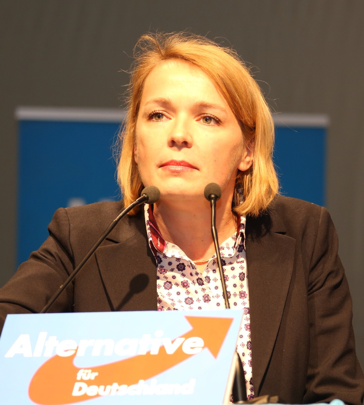 Ulrike Trebesius, AfD Parteitag 25.1.2014 in Aschaffenburg